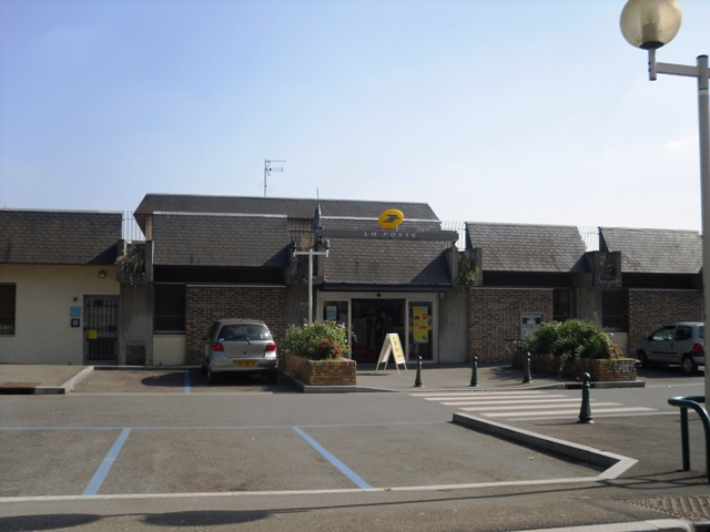 L'agence postale de Verrières-le-Buisson (91)